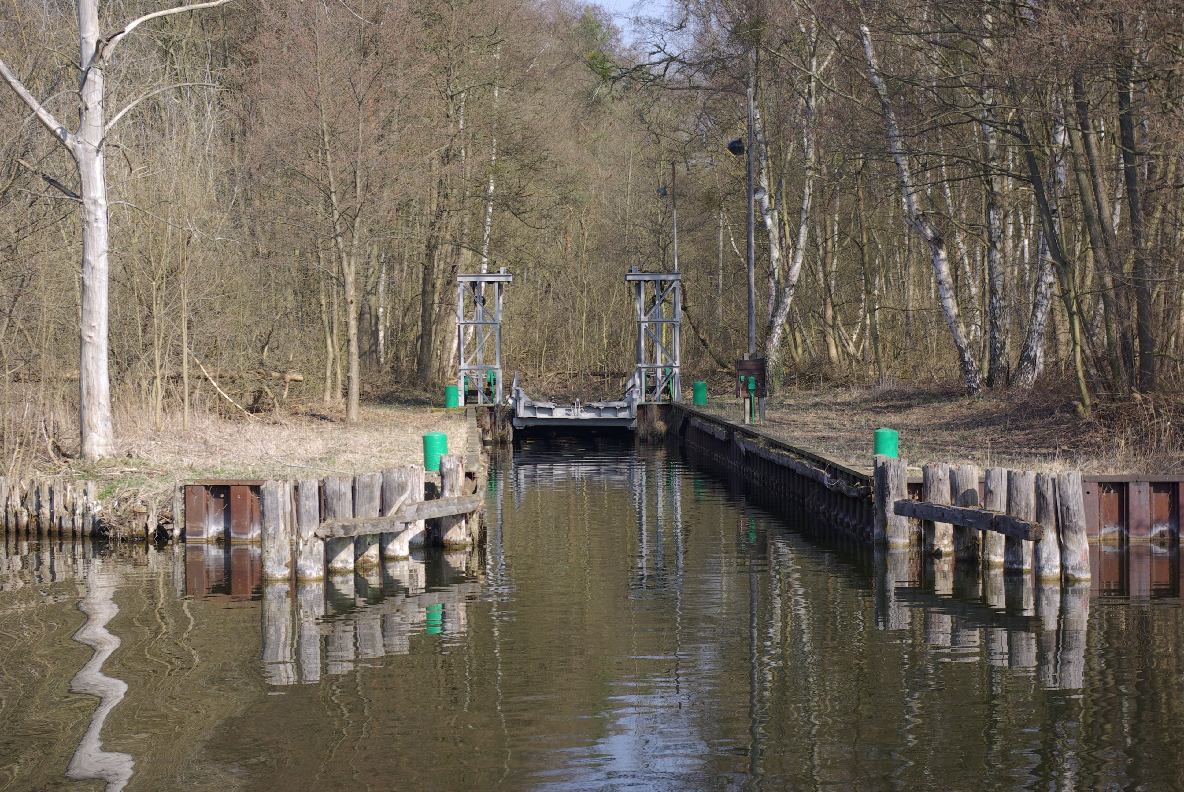 Fürstenberg/Havel in Brandenburg. Die Anlegestelle der Eisenbahnfähre an dem Nordufer der Havel. Die Fähre steht unter Denkmalschutz.